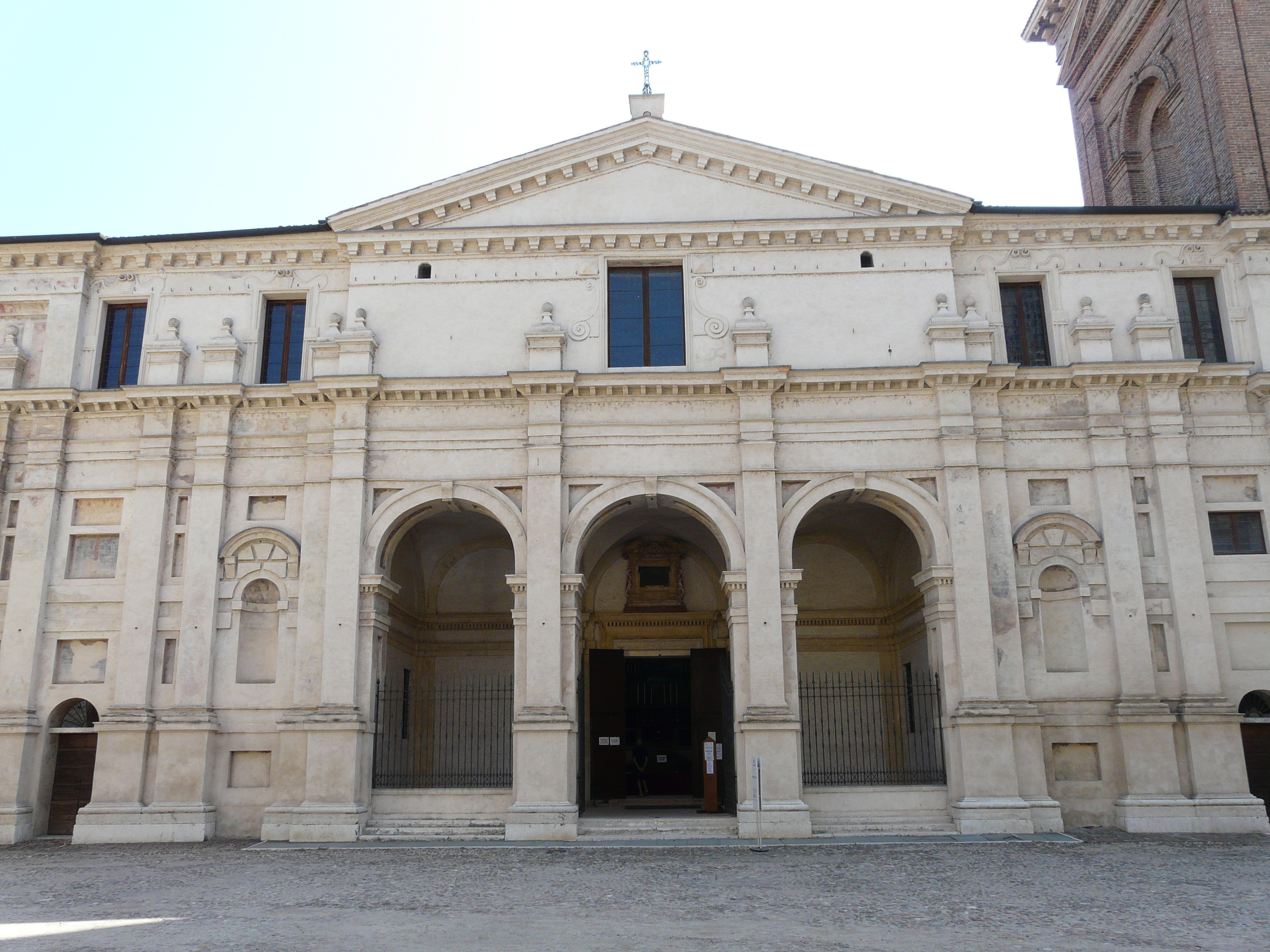 Basilica Palatina di Santa Barbara, Mantova, Lombardia, Italia